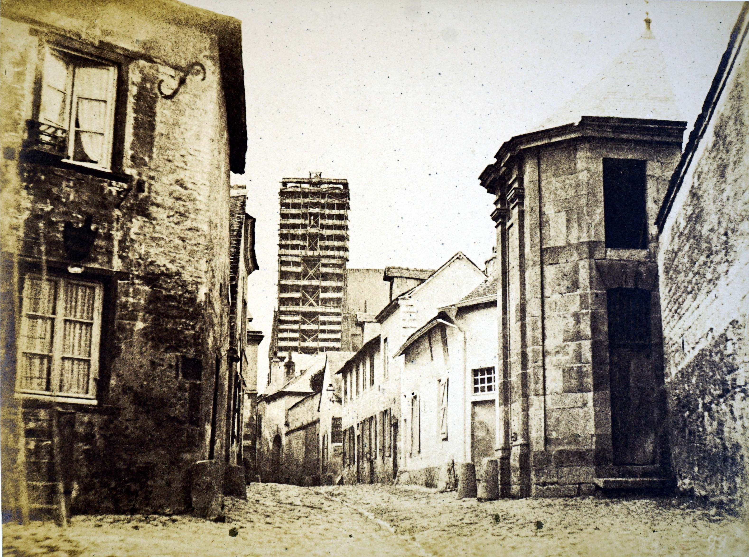 Photographie de Varin, édition de Dailly.